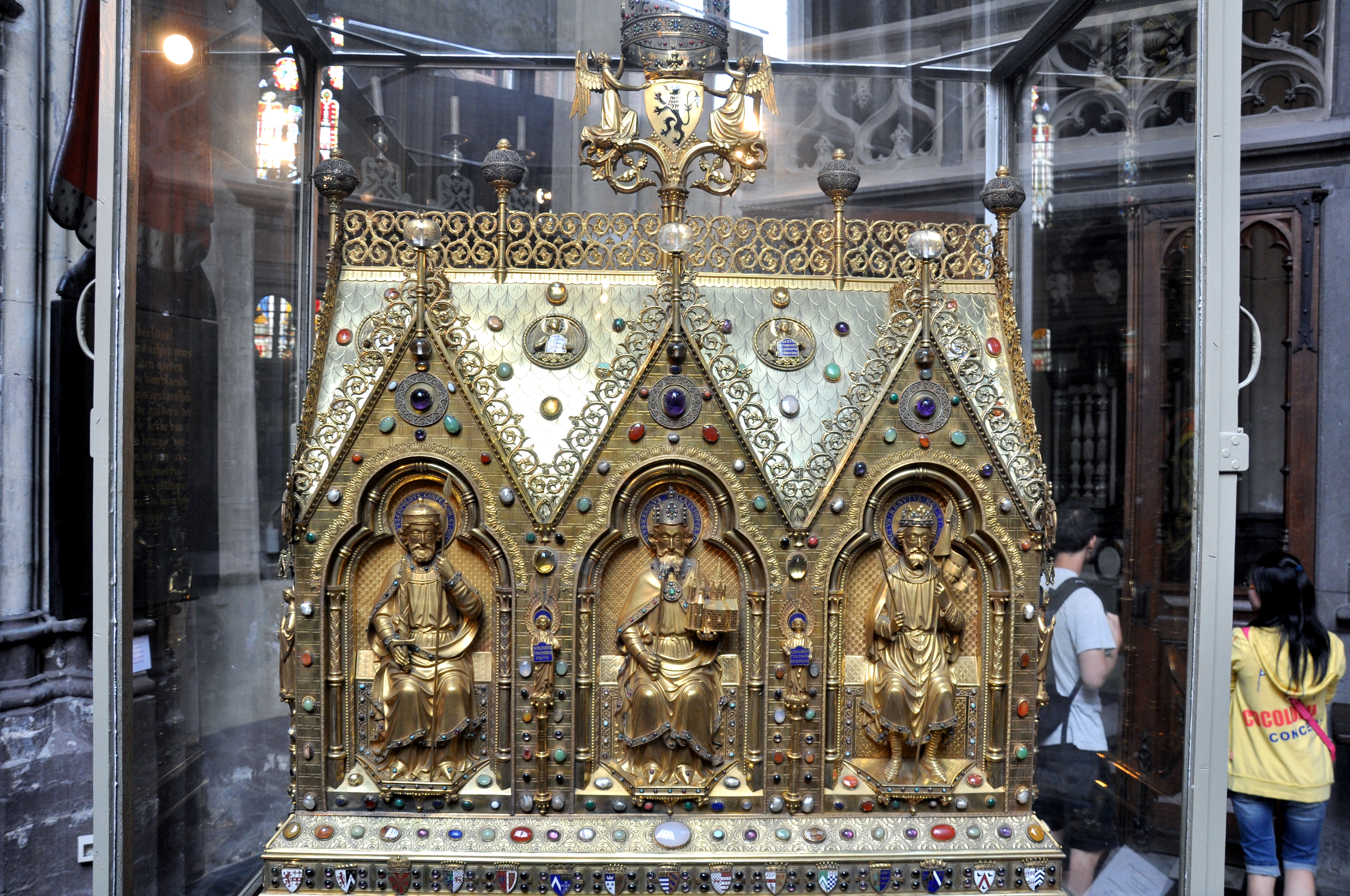 oeuvre de Jean-Baptiste Béthune, cathédrale Saint-Sauveur à Bruges